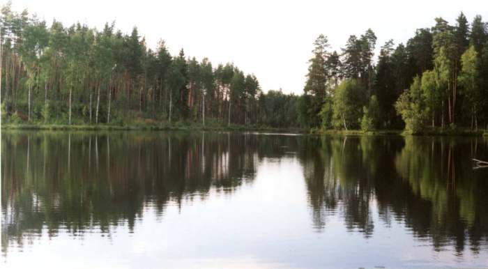 Üks Rooni järvedest